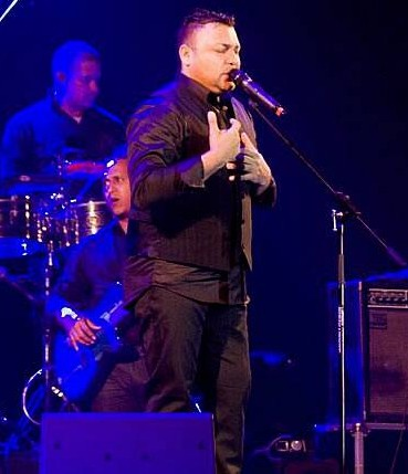 Concierto vallenato de Jean Carlos Centeno